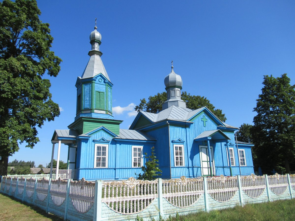 Царква Святога Мікалая ў Верхалессі Кобрынскага раёна Брэсцкай вобласці Беларусі